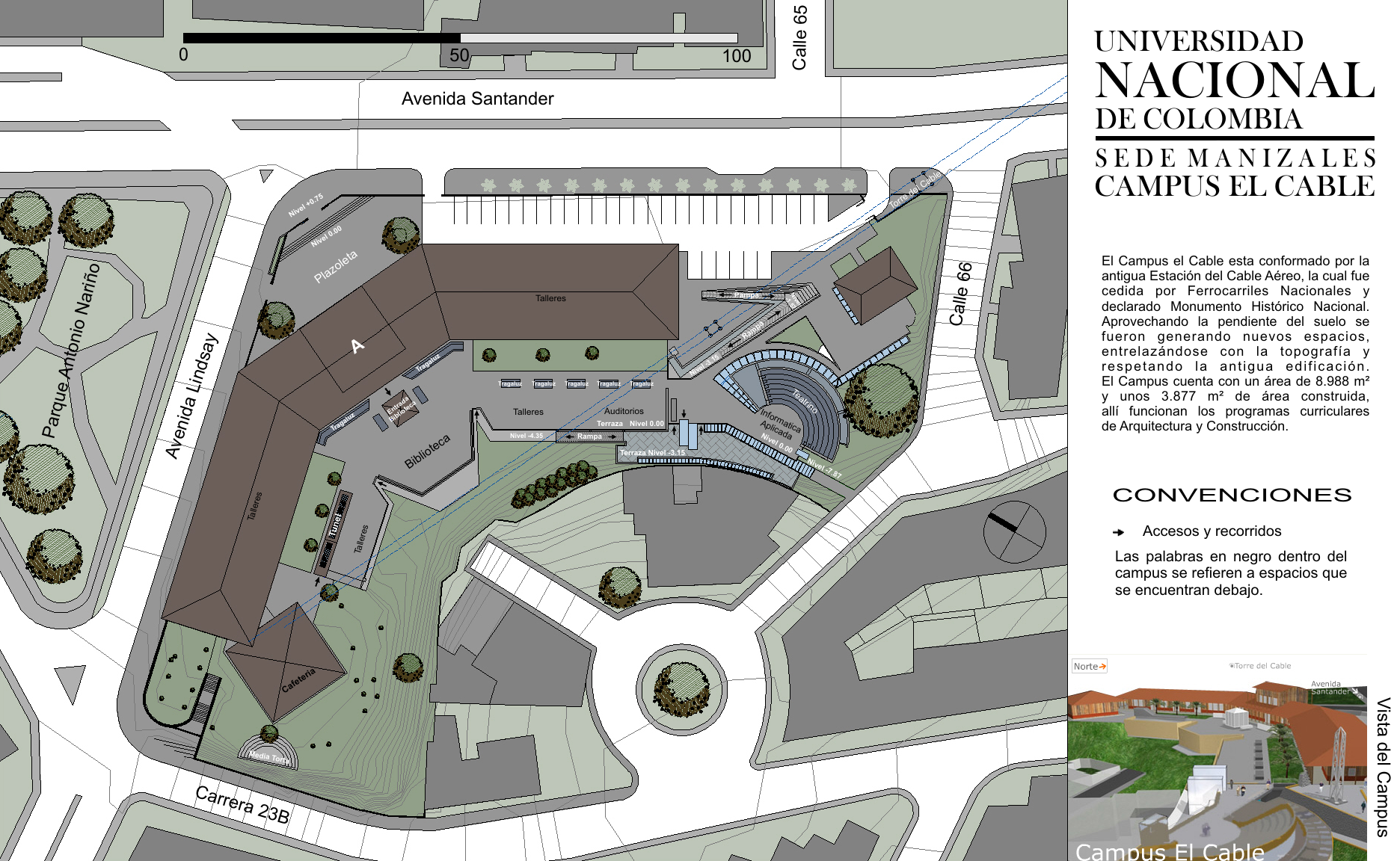 Plano de la Universidad Nacional de Colombia sede Manizales, Campus El Cable. El mapa esta basado en planos oficiales, si contiene algún error, favor notifíquelo en mi página de usuario, en la sección discusión.